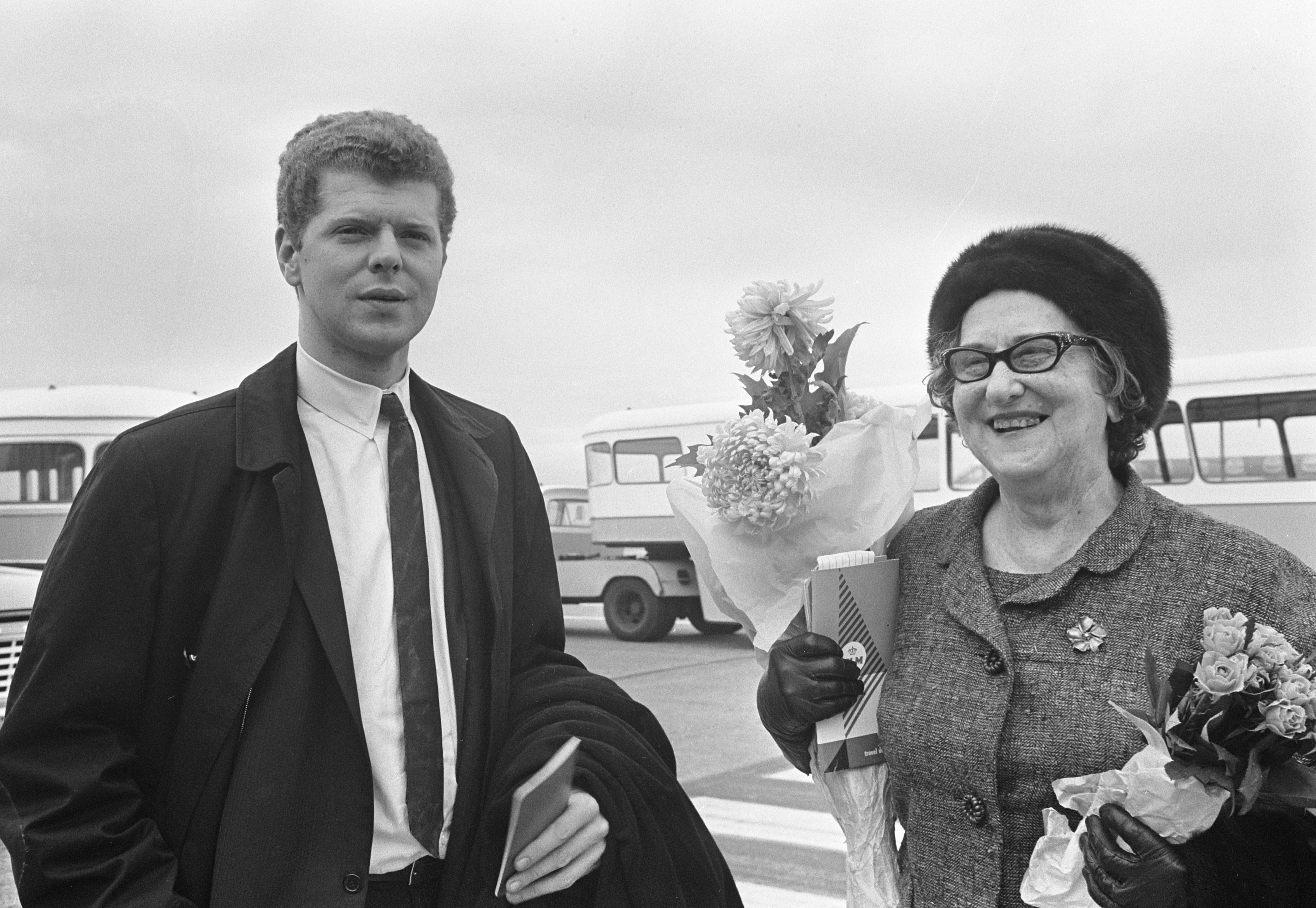 Aankomst van de Amerikaanse concert-pianist Harvey Lavan van Cliburn op Schiphol. Rechts de moeder van Harvey Lavan van Cliburn